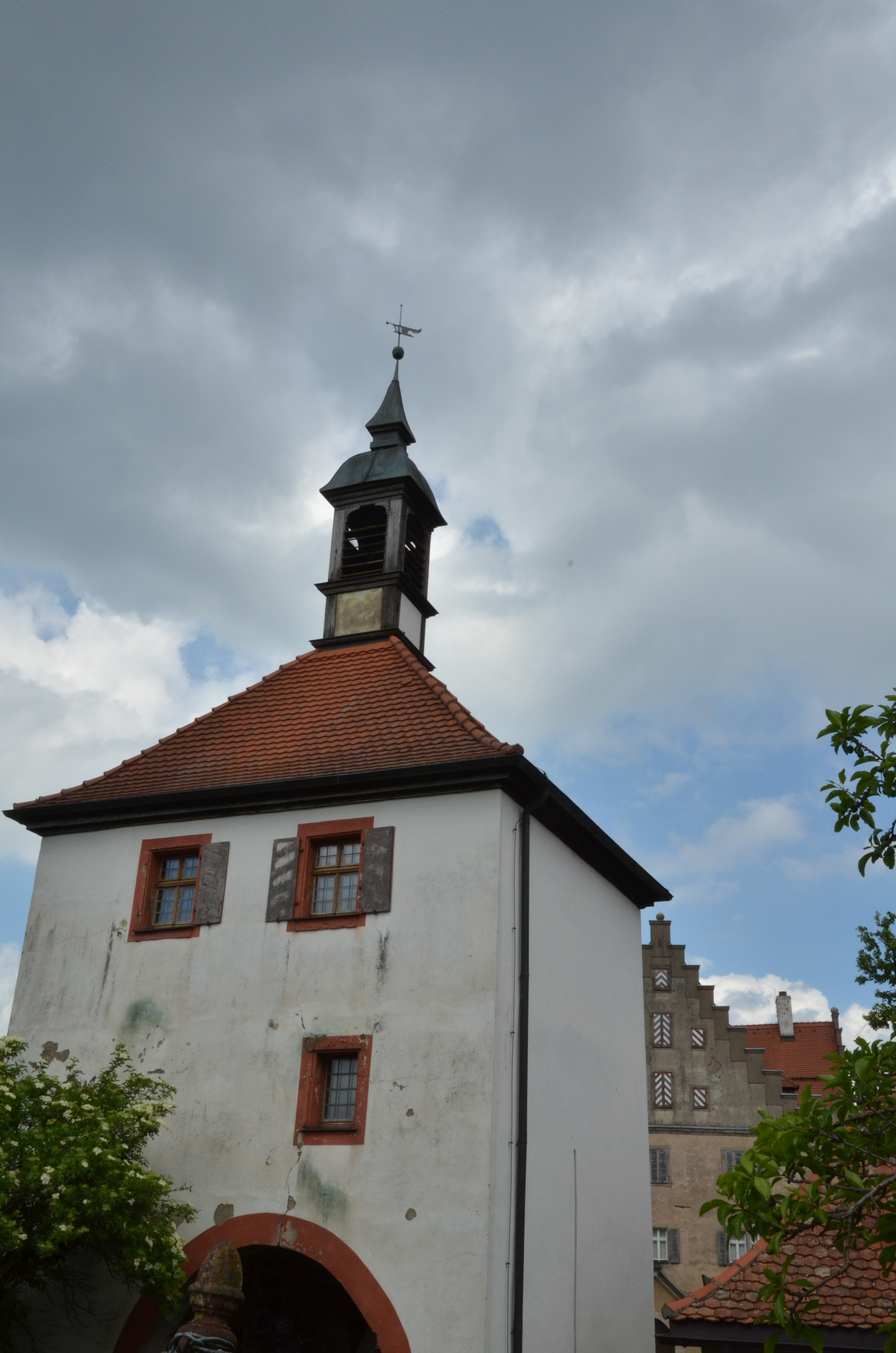 Unternzenn, Schloßtor